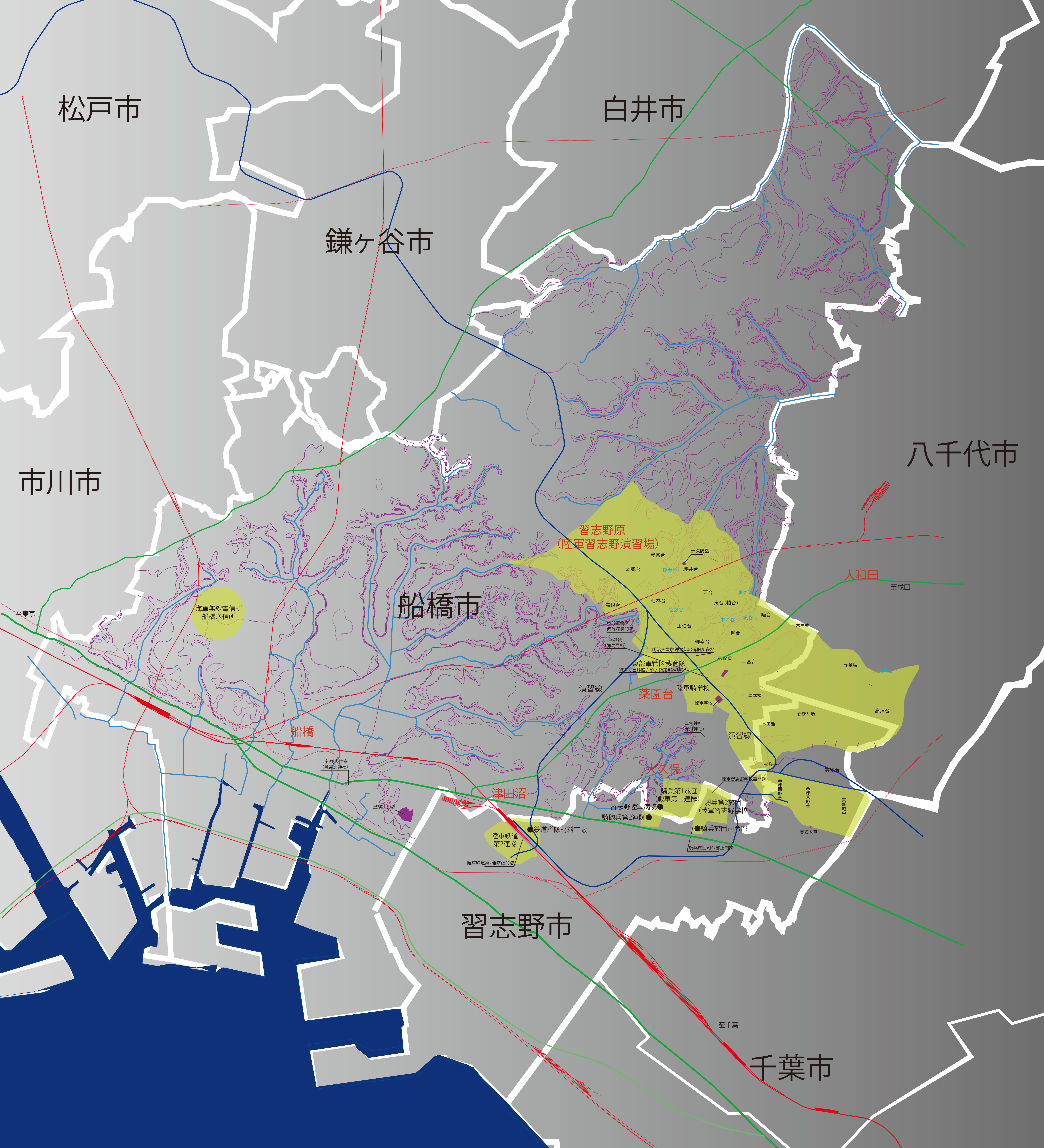 習志野原周辺の旧軍施設の配置図。